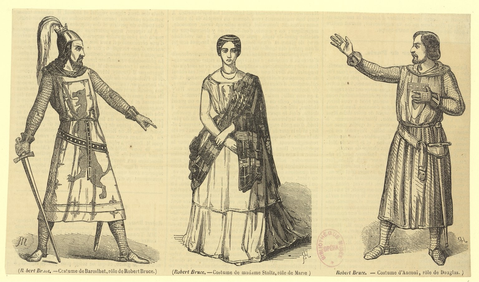 Rossini - Robert Bruce - Paris 1846 - Costumes - J.R. Paris : Théâtre de l'Opéra-Le Peletier, 30-12-1846 1 f. ; 13 x 22 cm (im.)